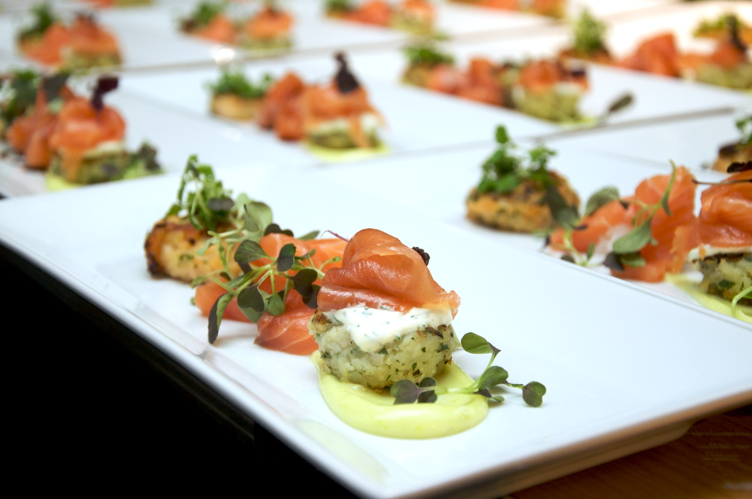 Excellent hors d'oeuvres